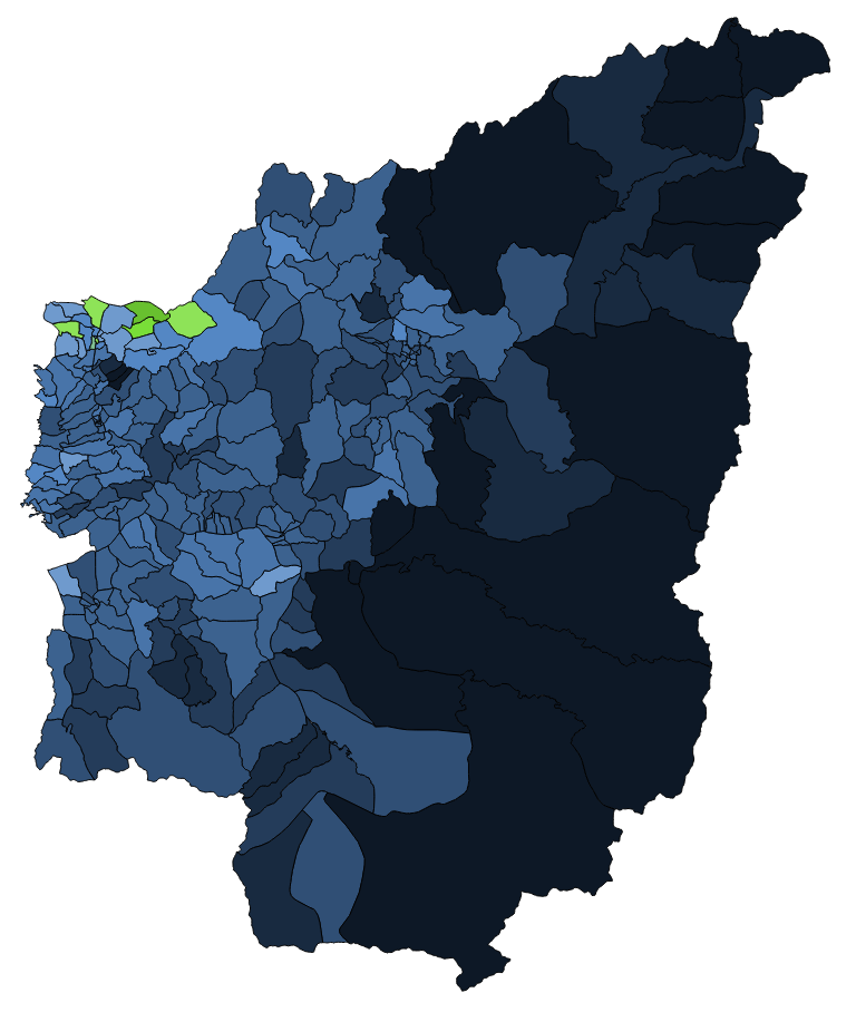 顏色對照表